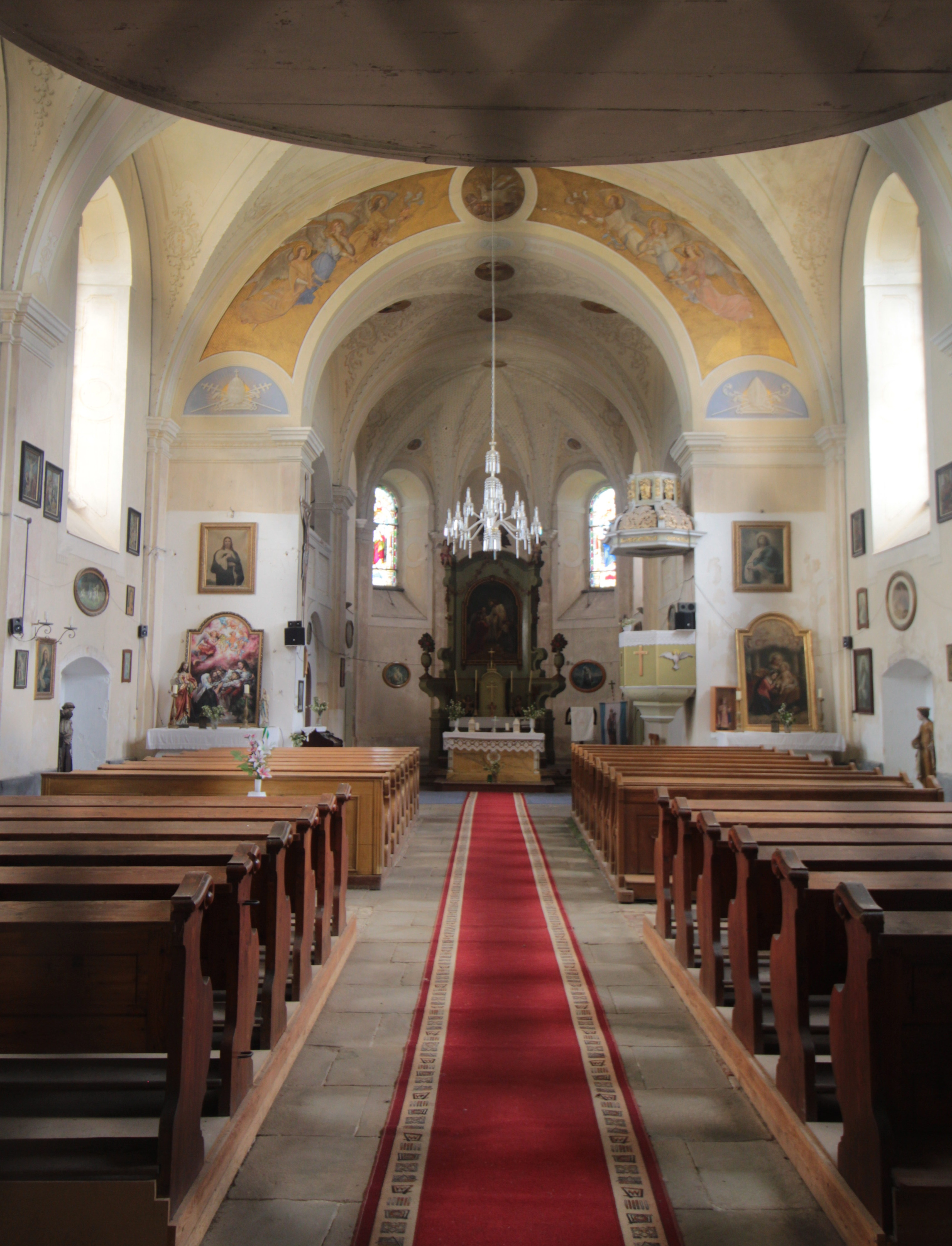 Dubnice, okres Česká Lípa, kostel Narození Panny Marie